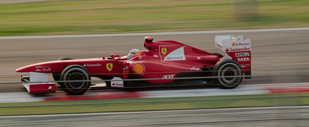 Fernando Alonso Gp Inde 2011